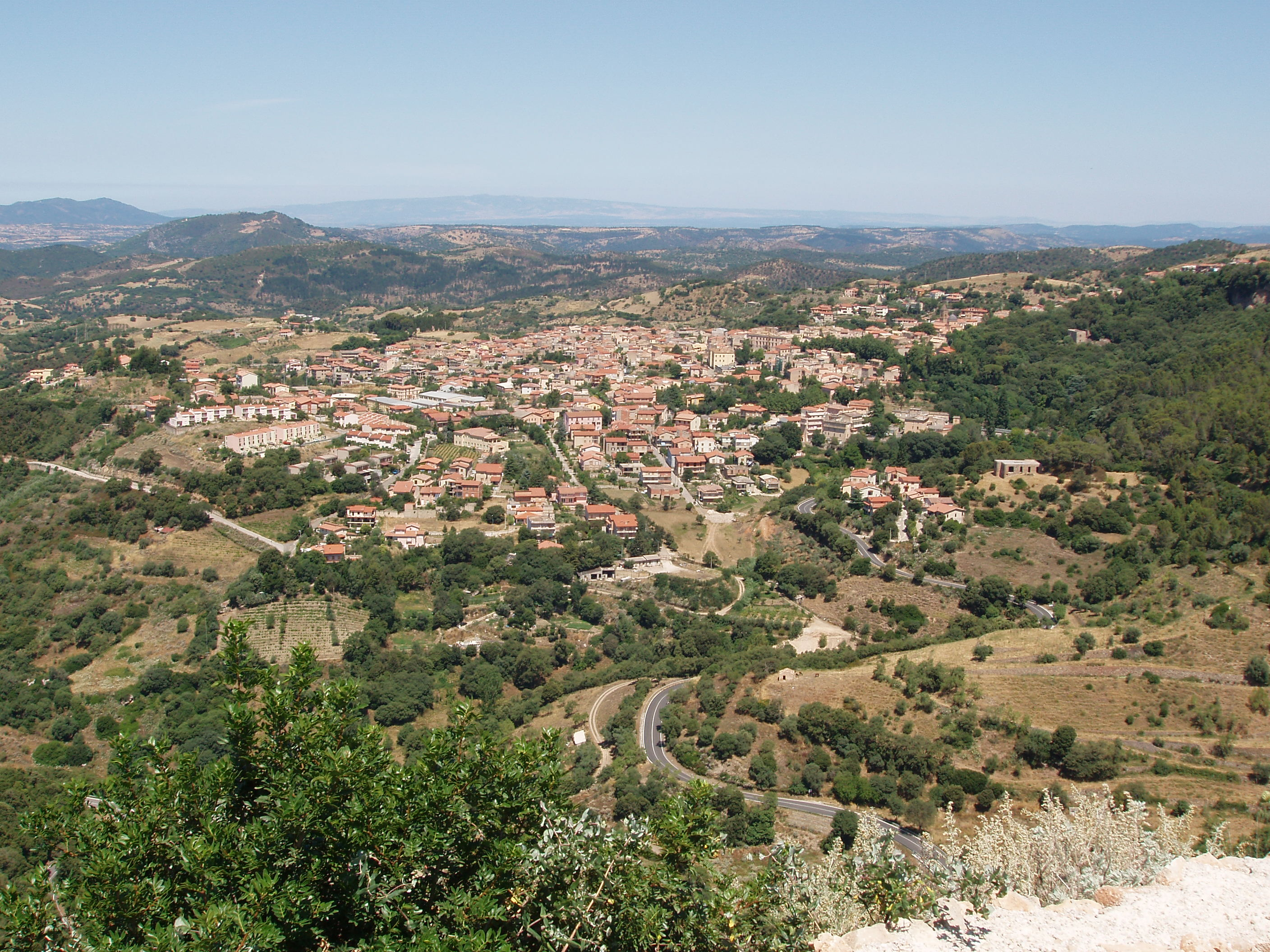 Panorama di Laconi (provincia di Oristano)